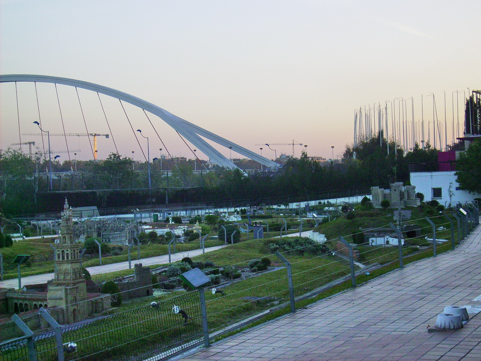 Sevilla. Expo 92. Panorámica parcial de la maqueta "El Balcón de Andalucía".